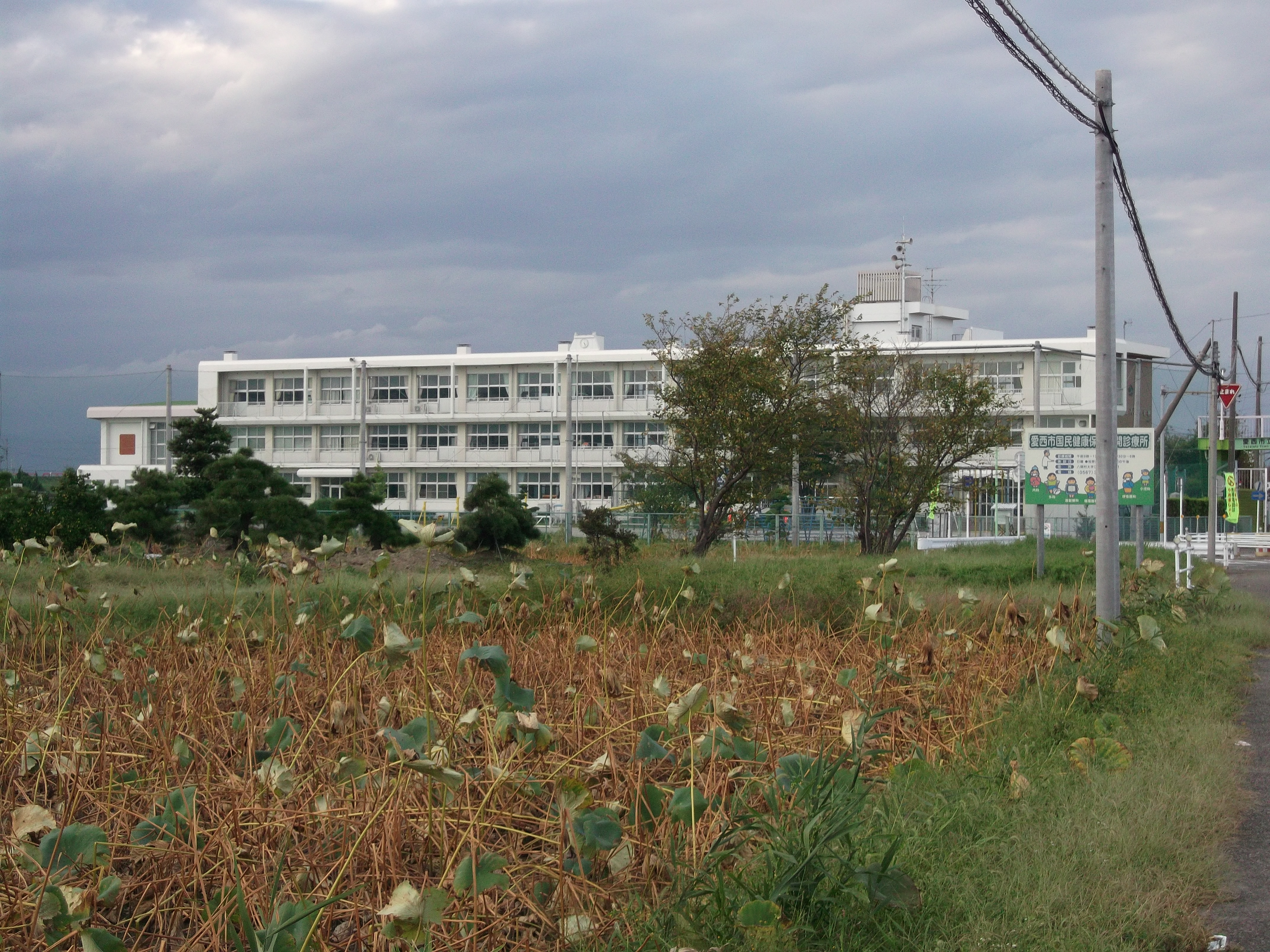 愛西市立石町の愛西市立八輪小学校を東側公道南側より撮影